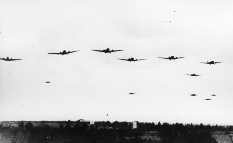 Nachschub für das deutsche Afrikakorps. Transportflugzeuge Ju 52 bringen den Nachschub für die deutschen in Afrika kämpfenden Truppen. 1.2.42 [Herausgabedatum]